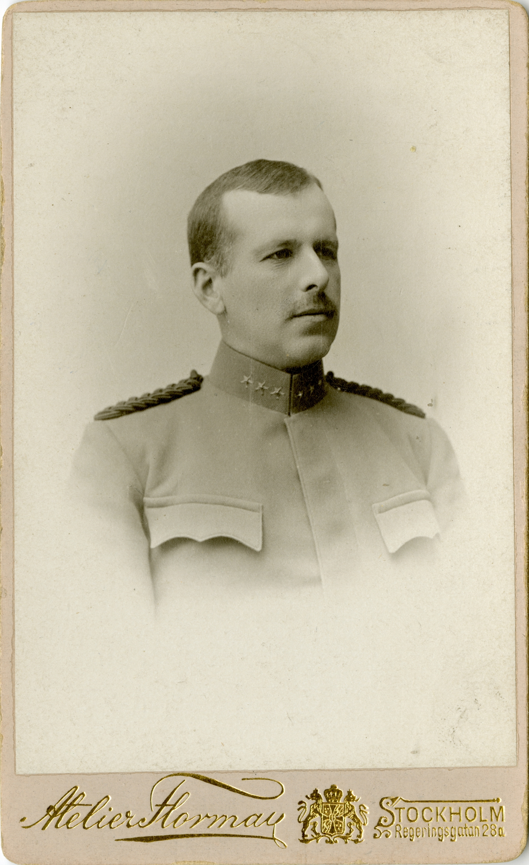 Porträtt av Carl Adolf Alfred Murray. Tillhör Armémuseums arkiv.